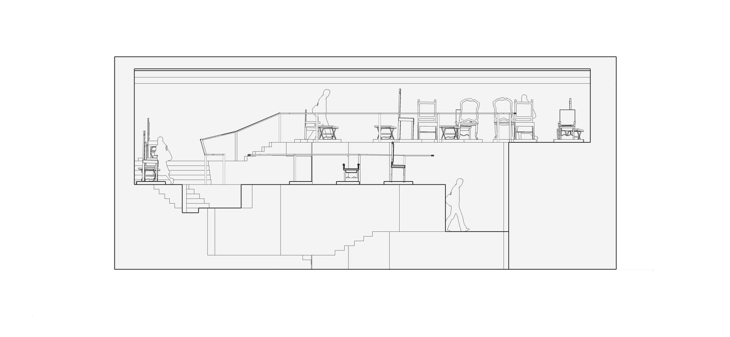 Template:Screenshotcopyrighted